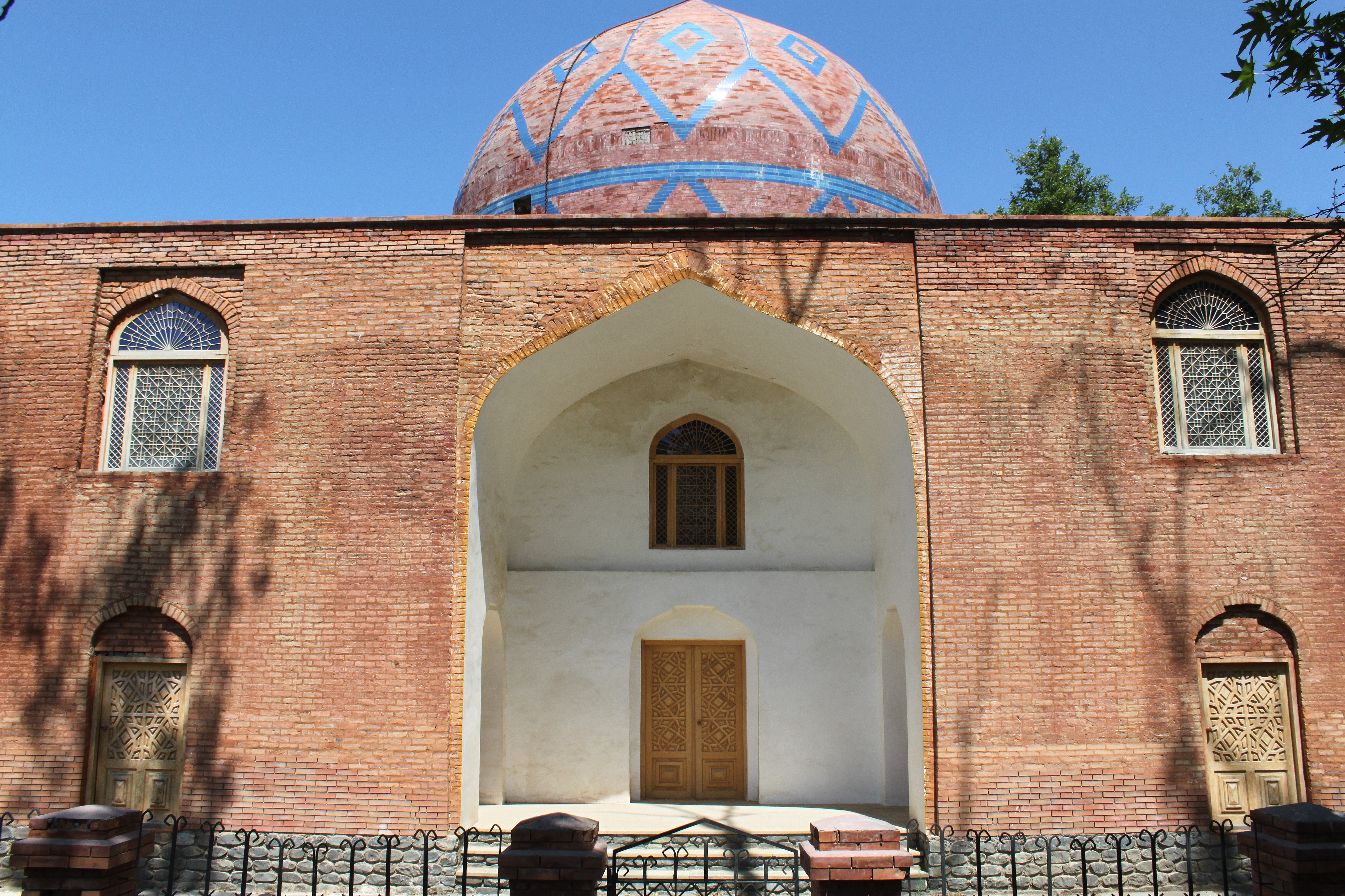 Мавзолей шейха Джунейда в селе Хазра, Гусарского района Азербайджана.